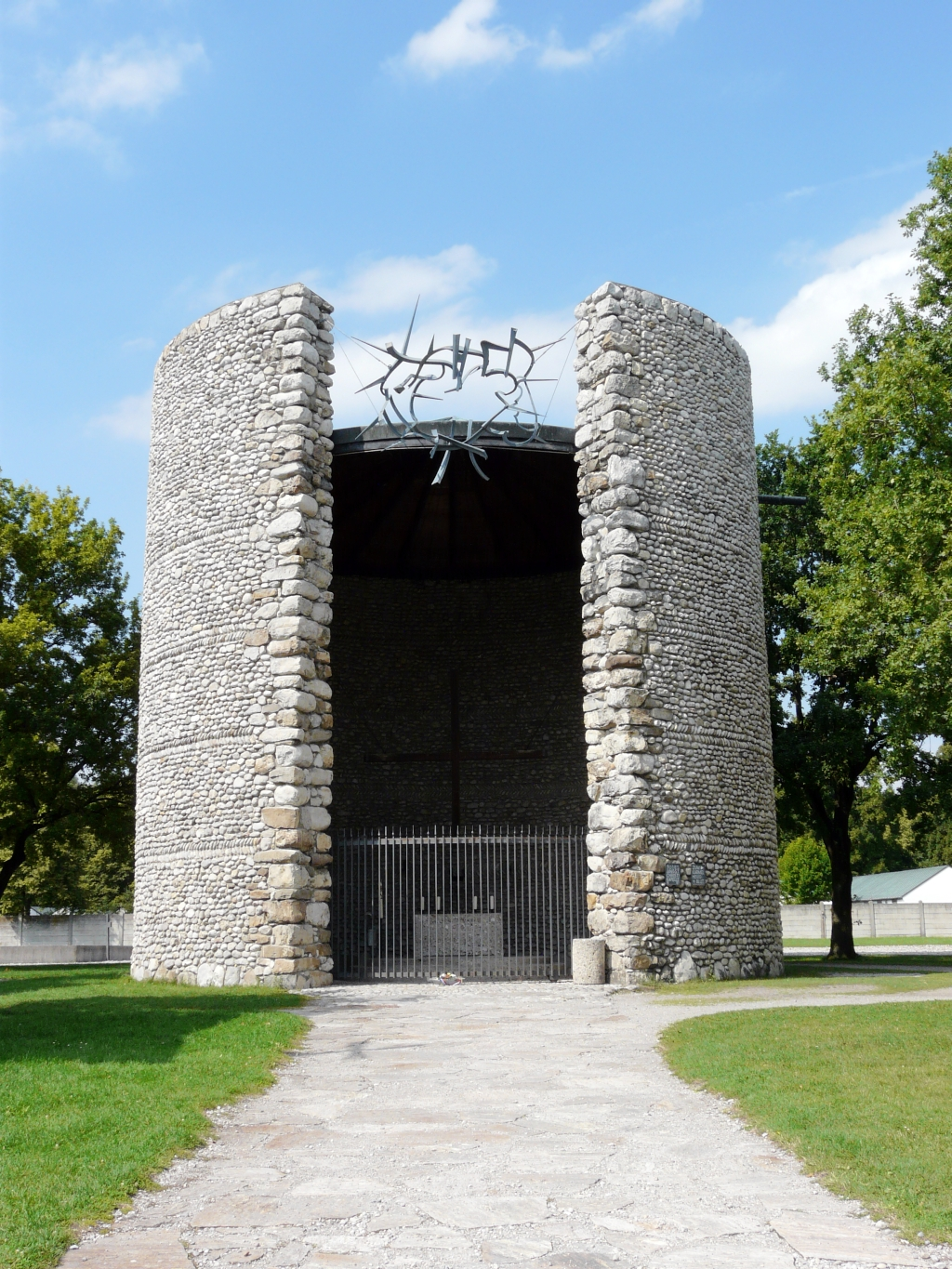 Katholische Todesangst-Christi-Kapelle; erstes religiöses Mahnmal aus dem Jahr 1960 im Konzentrationslager Dachau.